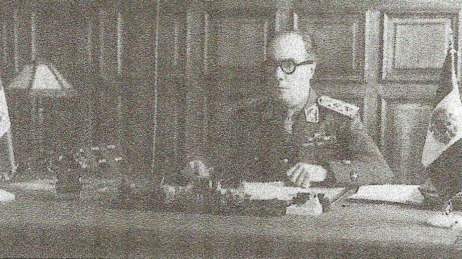 En el despacho del General Fernando Rincon Jaramillo